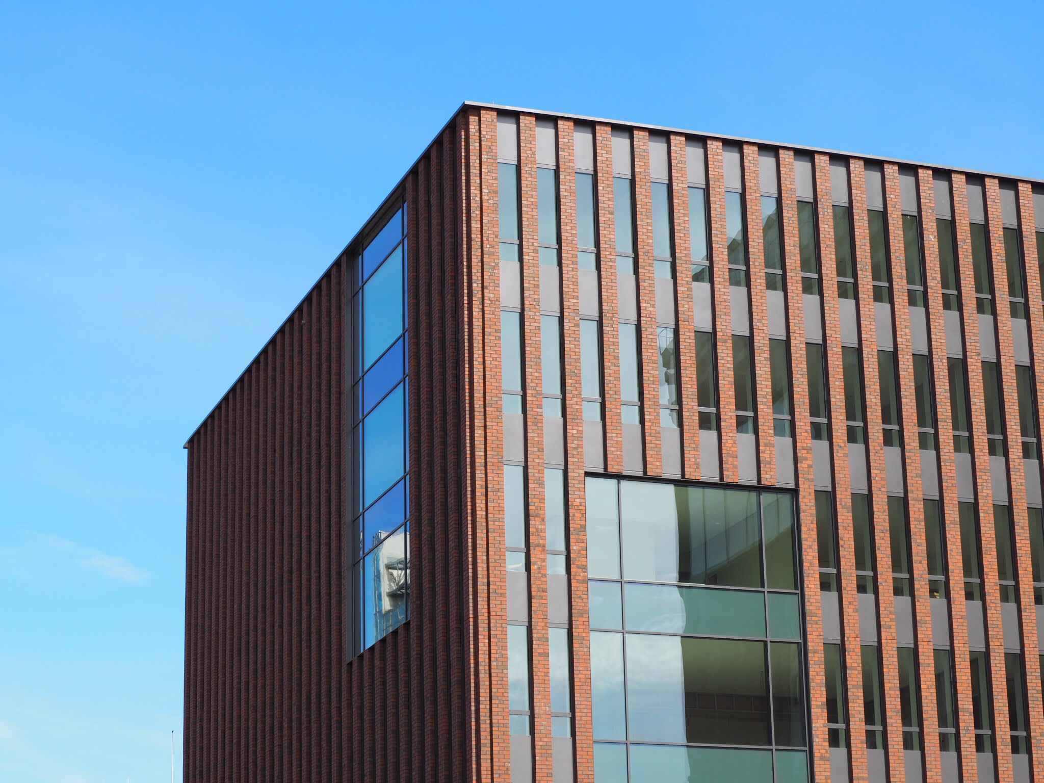 Neues Verwaltungsgebäude Thyssengas am Dortmunder U, Emil-Moog-Platz 13, Dortmund